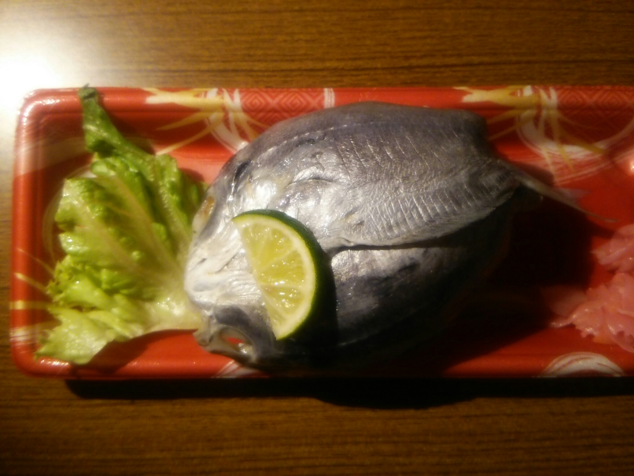 徳島の名物えぼだい（ぼうぜ）の姿寿司、カボス載せ